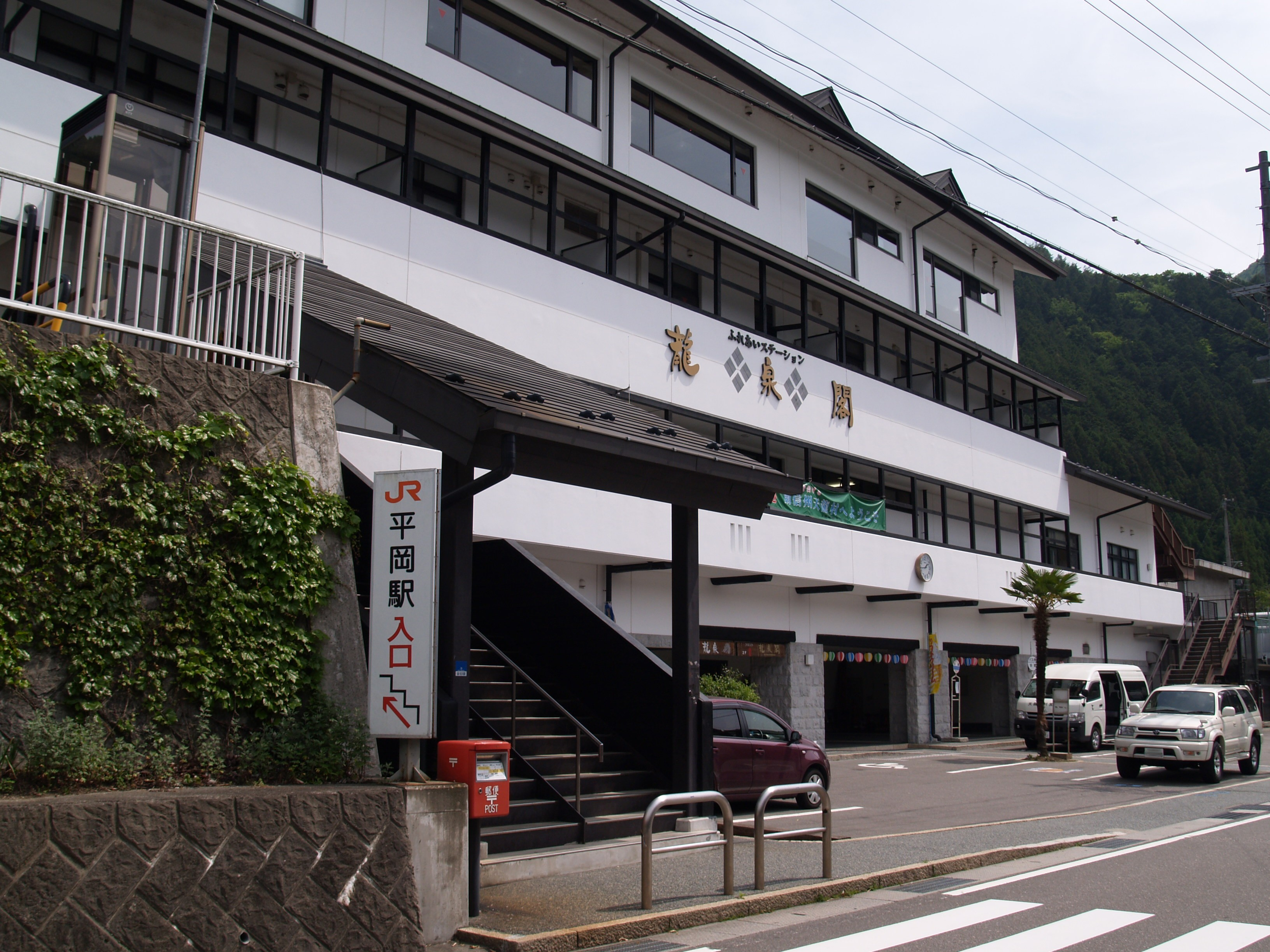 平岡駅。「ふれあいステーション龍泉閣」との併設。